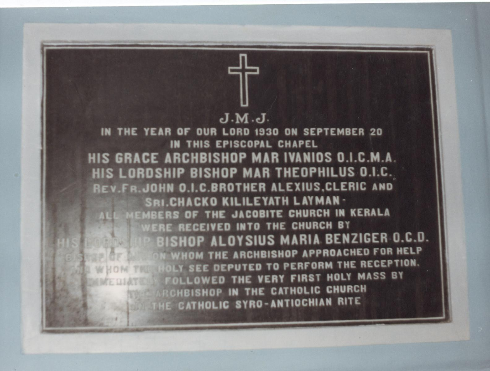 Gedenktafel an Bischof Benziger und die Gründung des Syro-Malankarischen Ritus, im Bischofshaus Quilon, Kerala, Indien